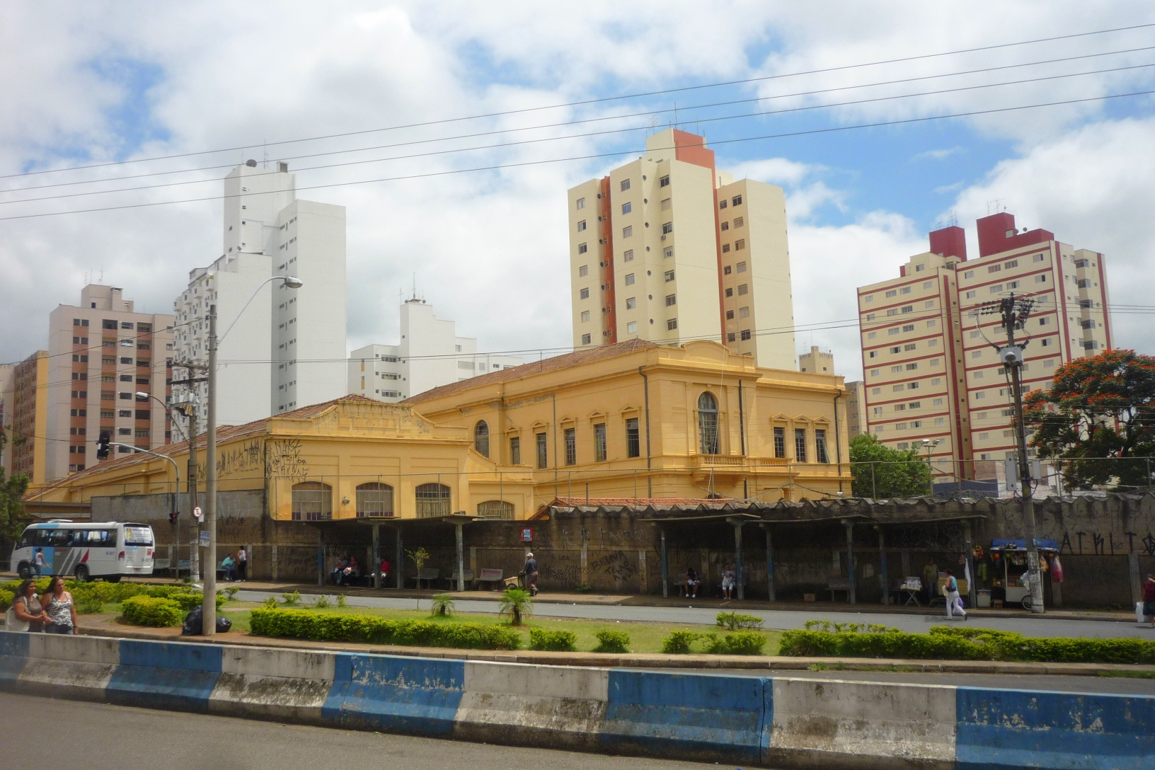 Cotuca